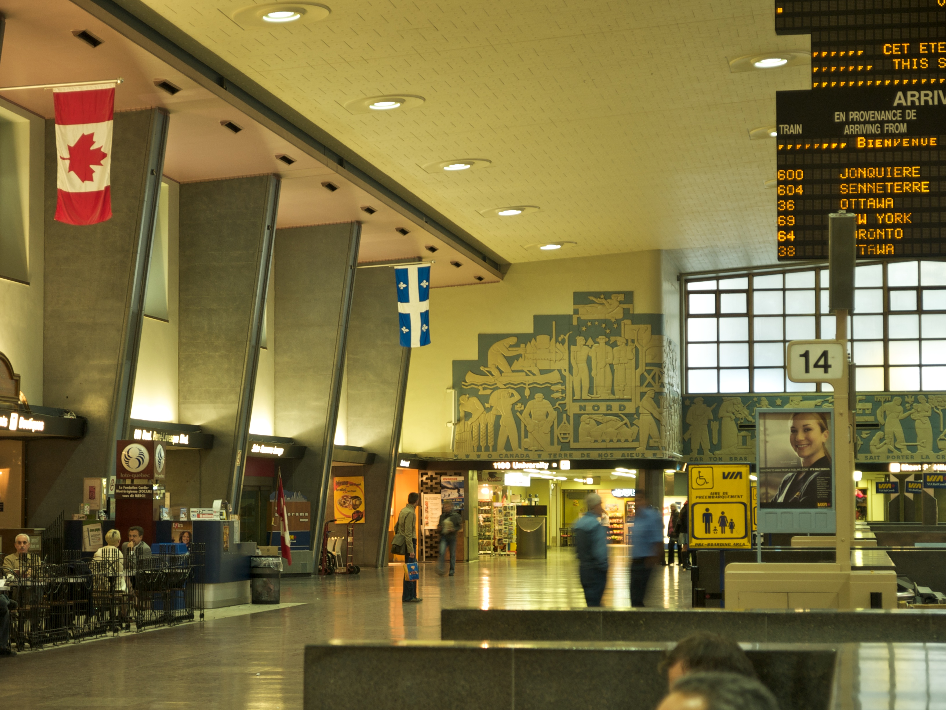 Gare centrale